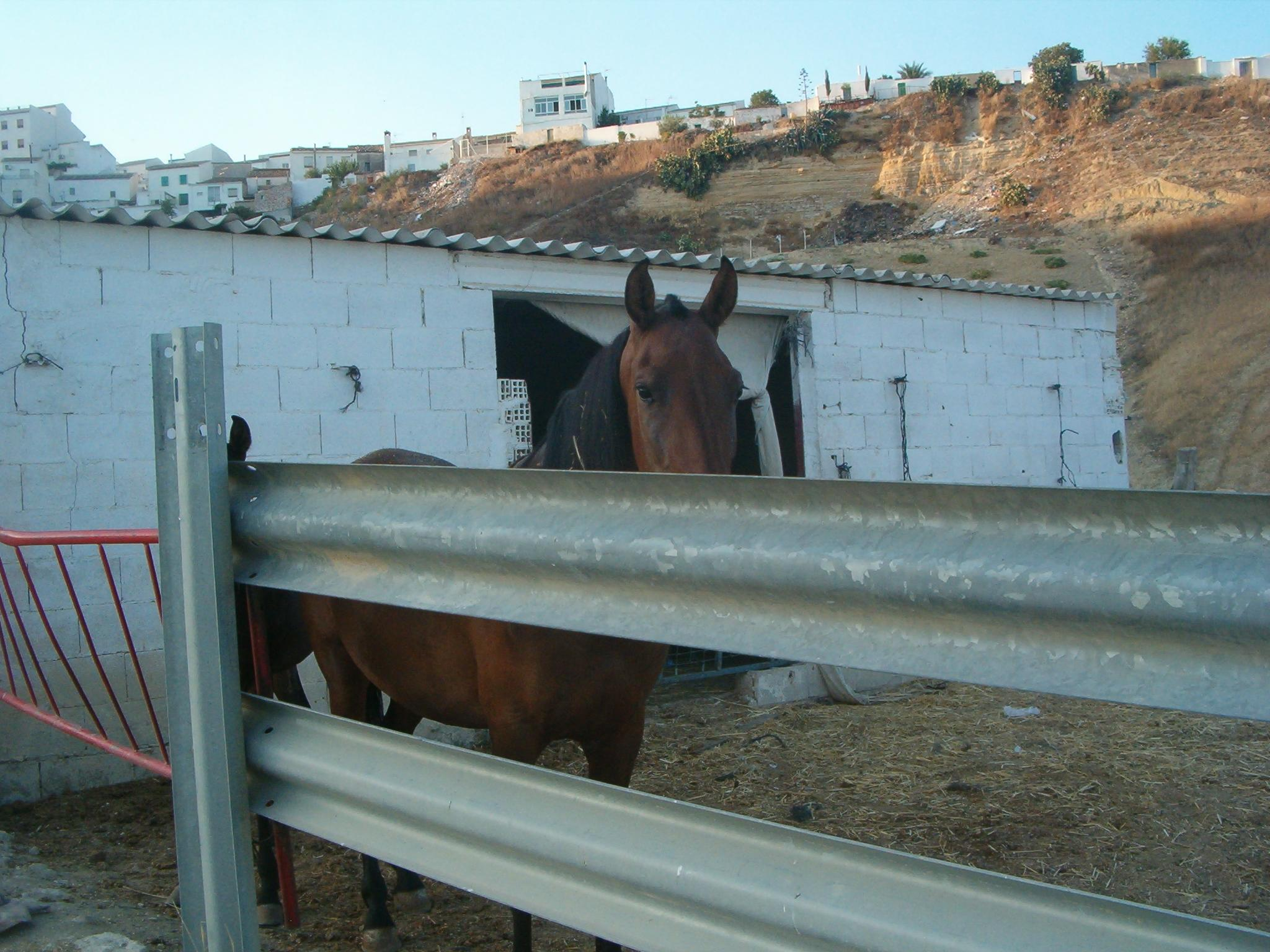 Caballo en las afueras de Arjona.